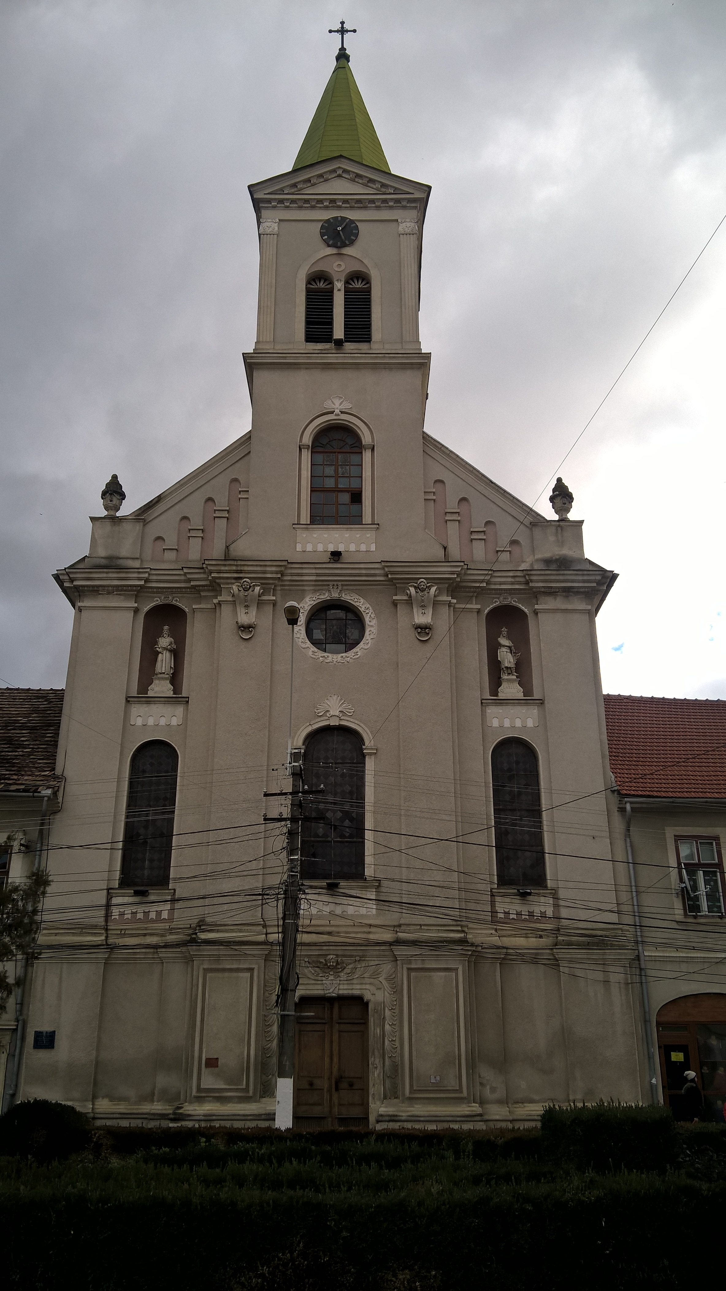 Biserică 01